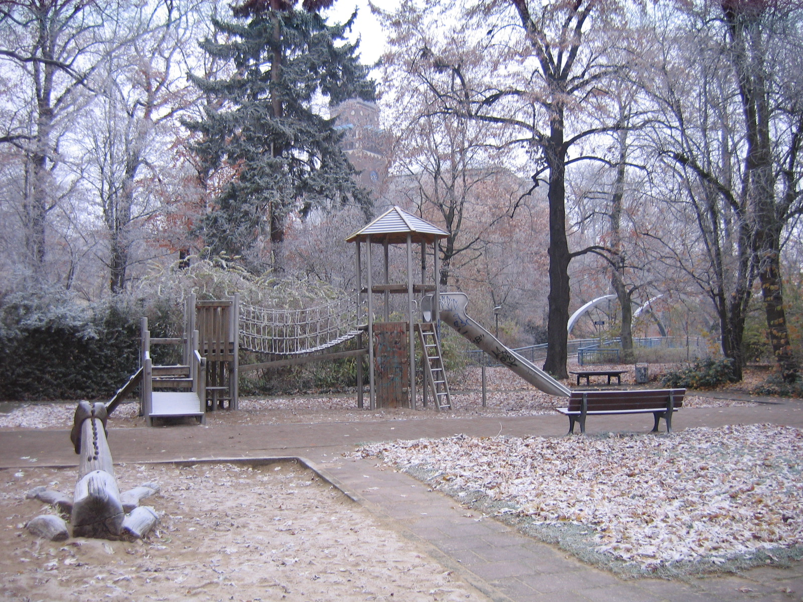 Kinderspielplatz im Ghoetepark